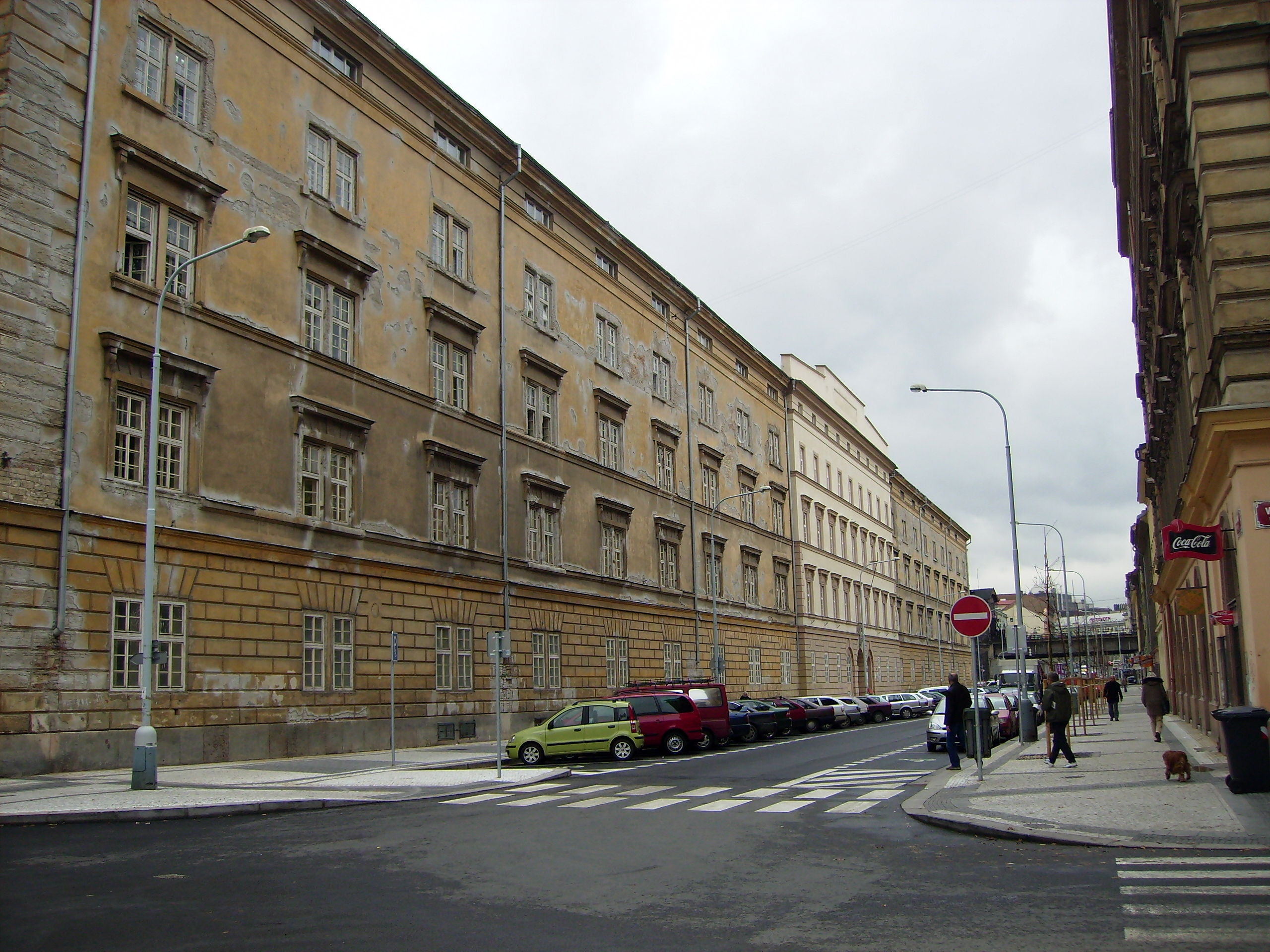 Kasárny v pražském Karlíně.